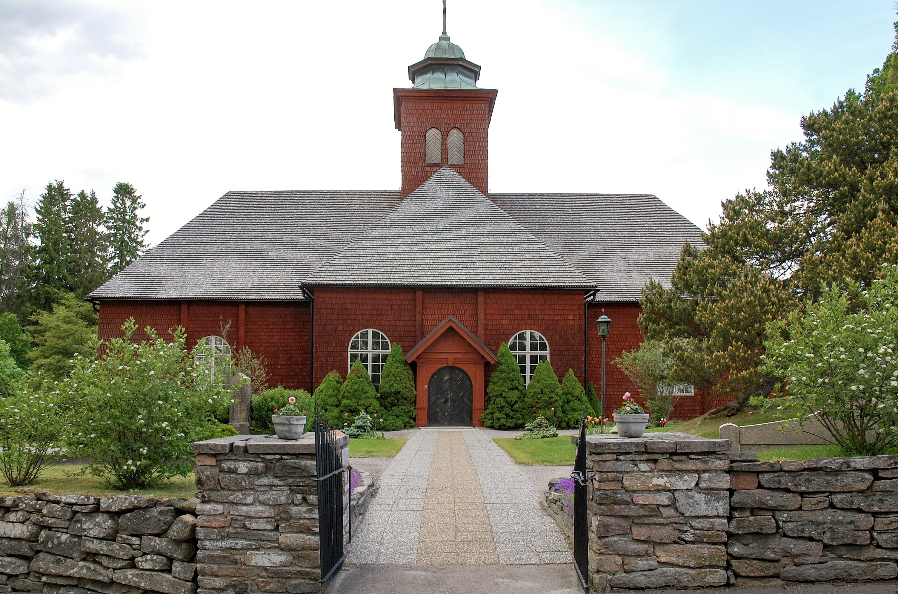 Alster kyrka